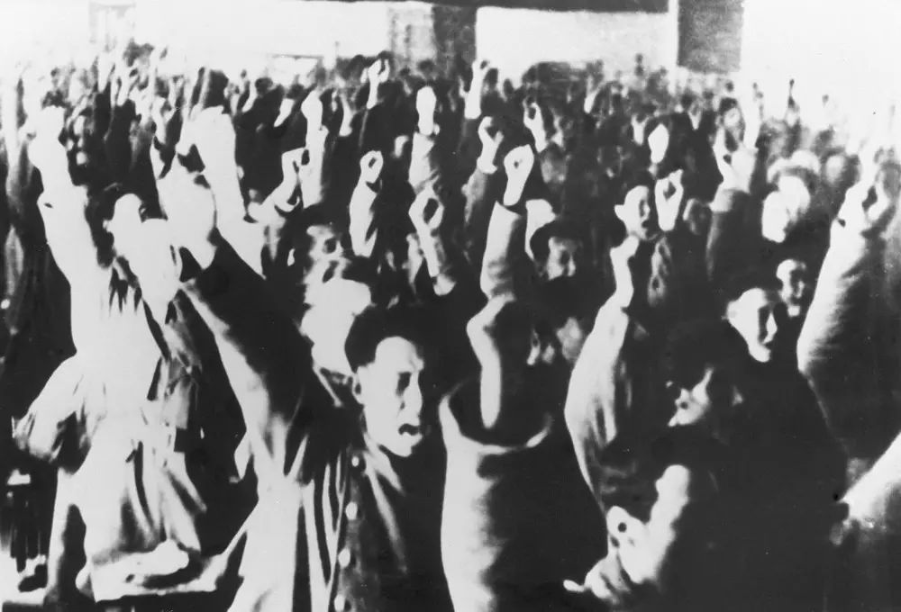 原图注：内蒙古人民代表会议通过成立内蒙古自治政府的决议，代表们高呼口号（1947年4月23日摄）。 新华社发